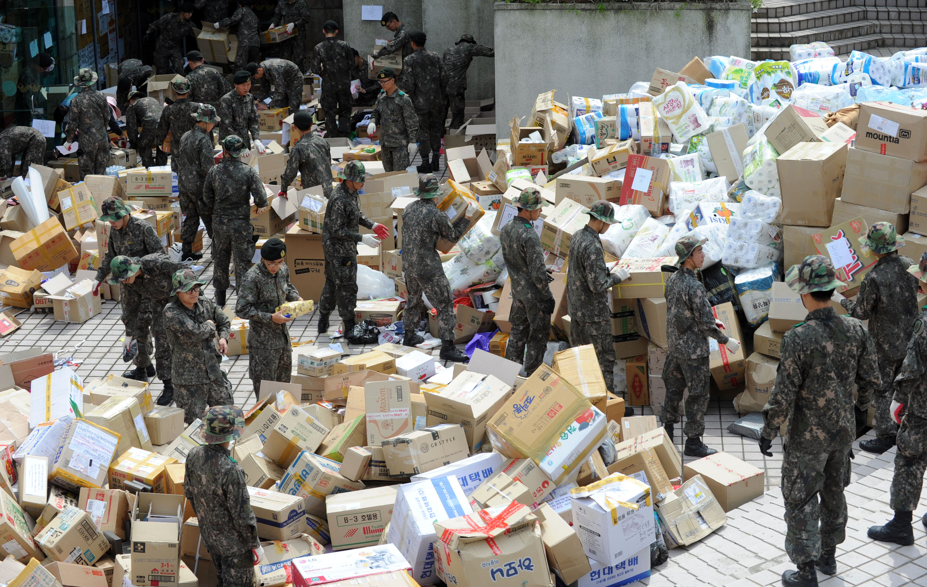 실종자 가족 대민지원에 투입된 군 장병들이 21일 오후 진도문화예술회관에서 전국 각지에서 보내온 구호물품을 재분류 하고 있다. 촬영 - 김태형 기자